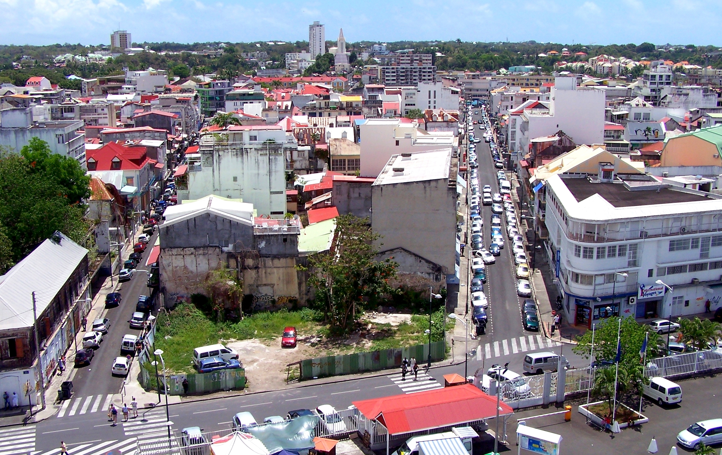 castries